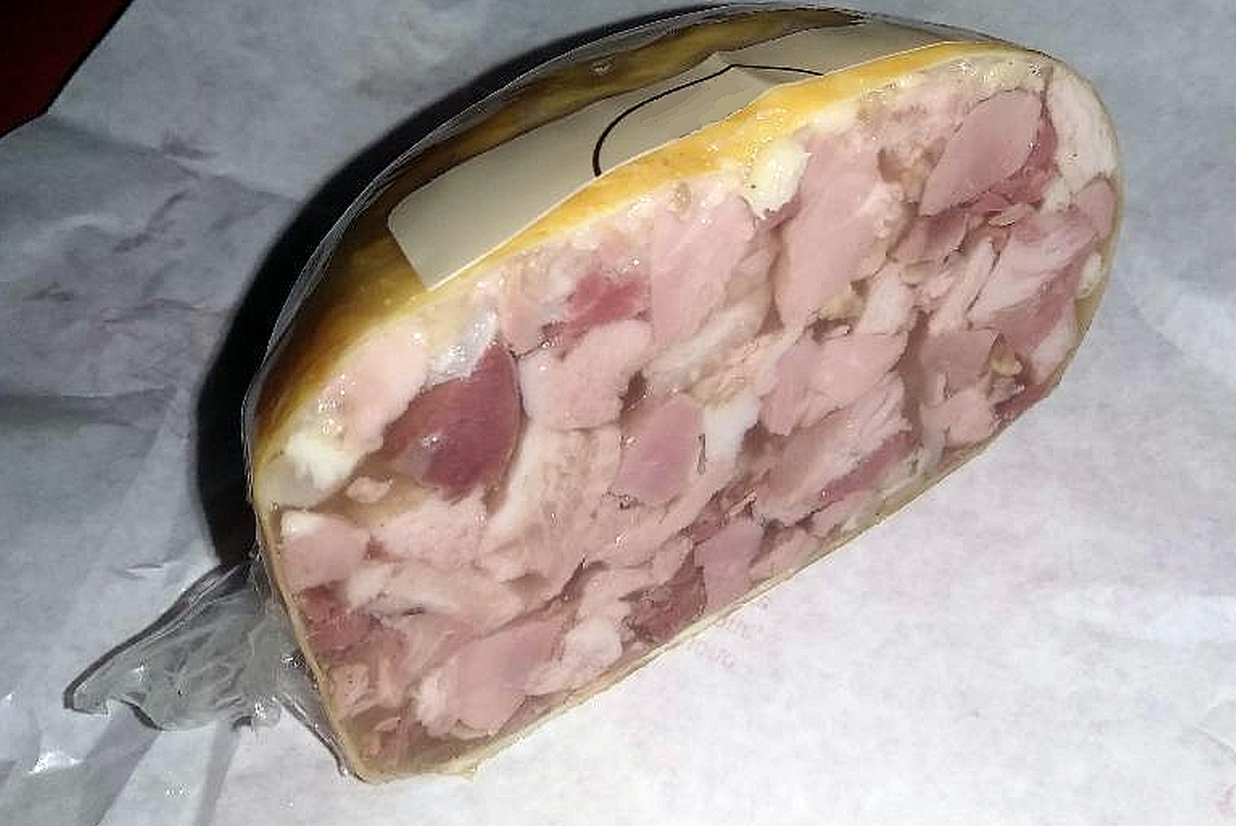 Tobă, un tradizionale salume romeno a base di frattaglie di maiale